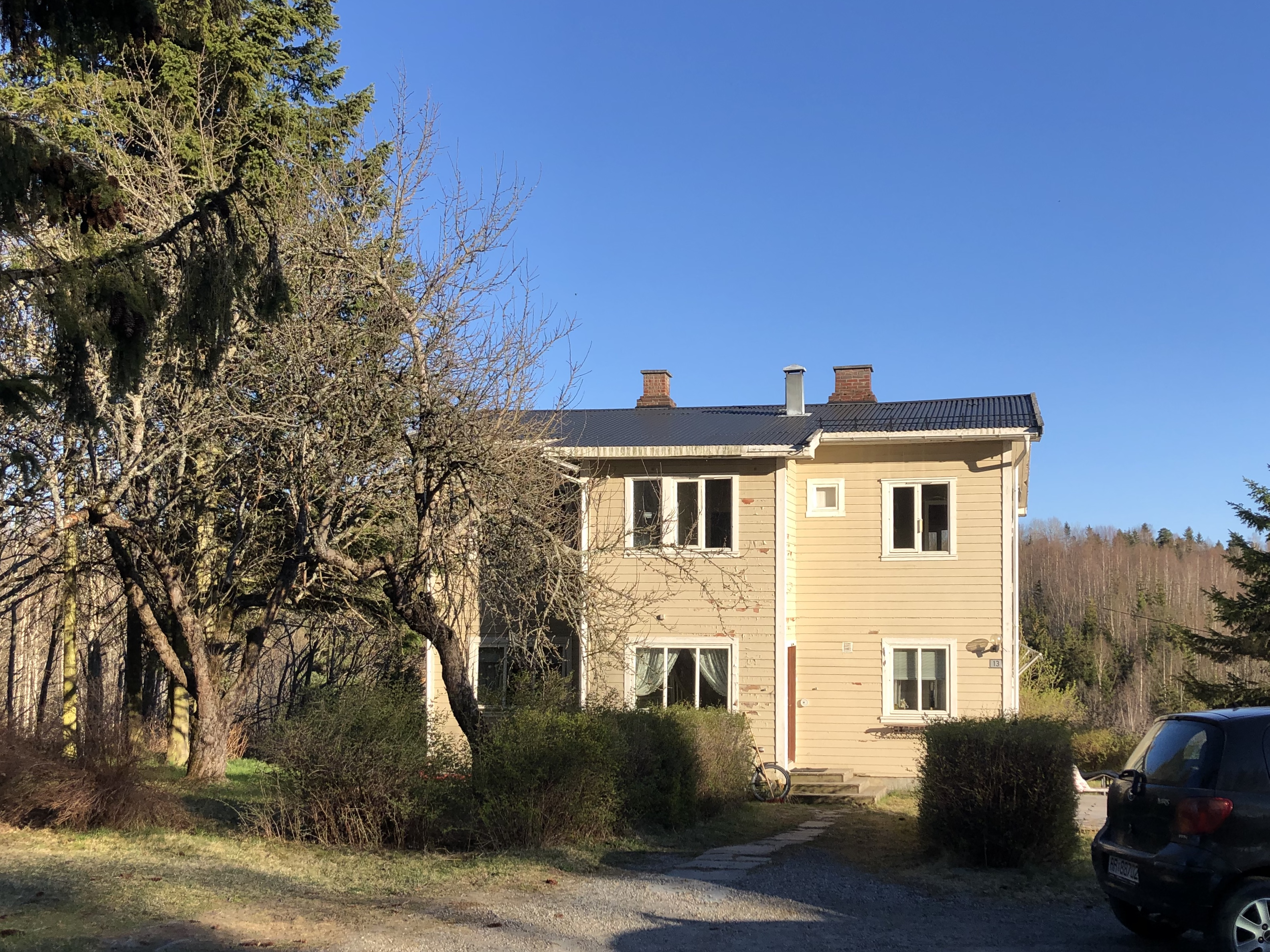 Vesternbakken 13, Ringerike